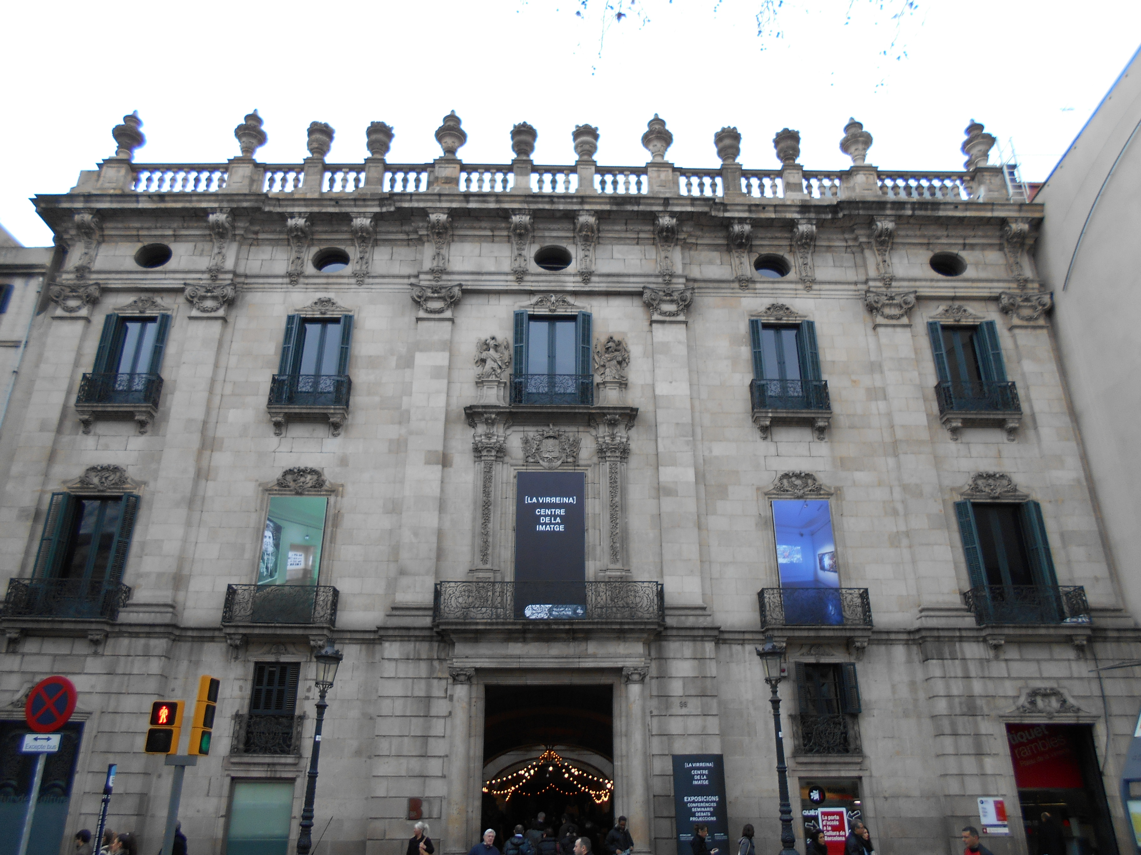 Palacio de la Virreina.